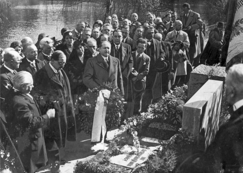 ADN-ZB/Archiv Berlin: Gottfried Benn legt im Namen der Dichter-Akademie einen Kranz am Grabe des Schriftstellers Arno Holz auf dem Friedhof an der Heerstrasse nieder. (Aufn.: 1933) 13933-33